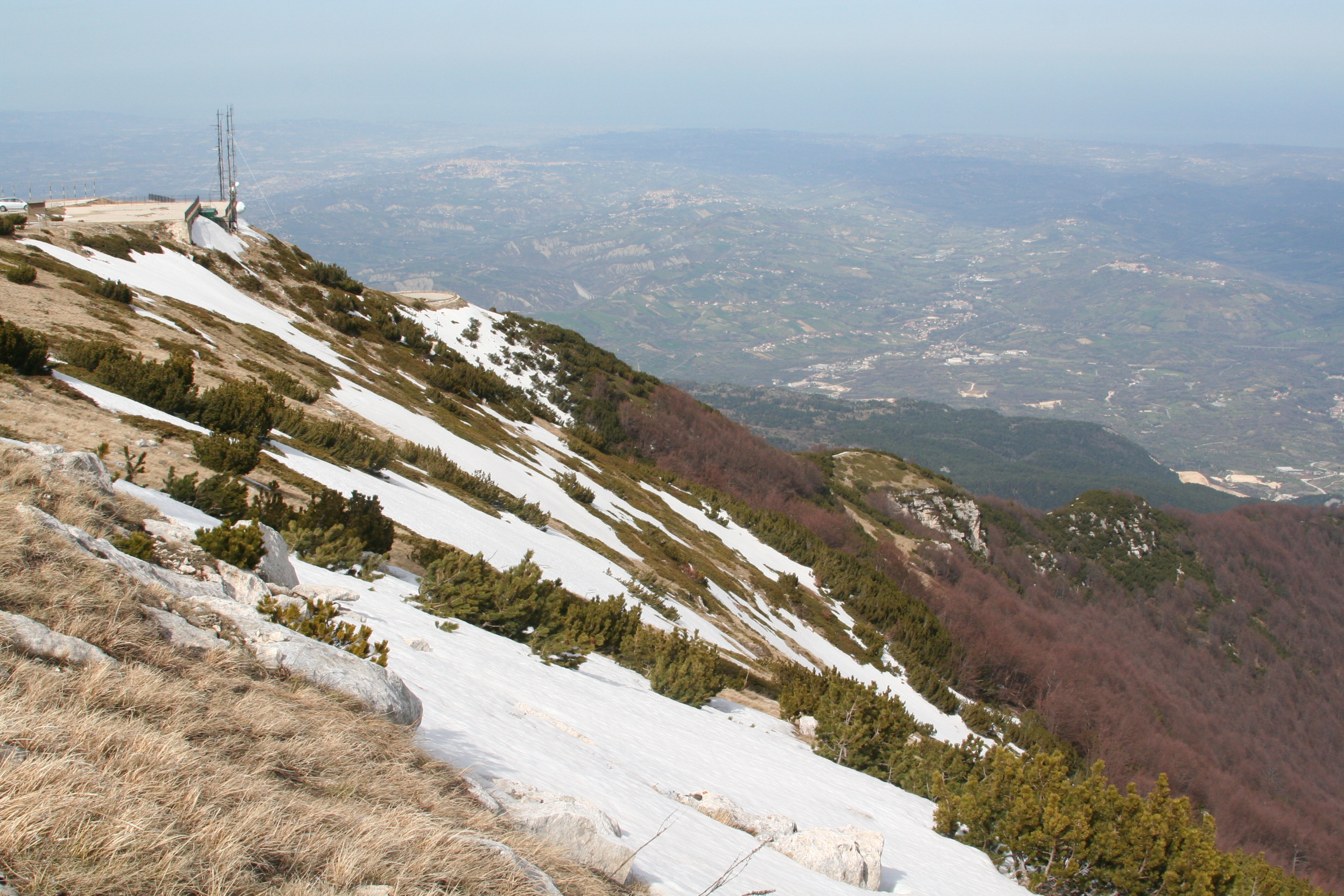 Blockhaus